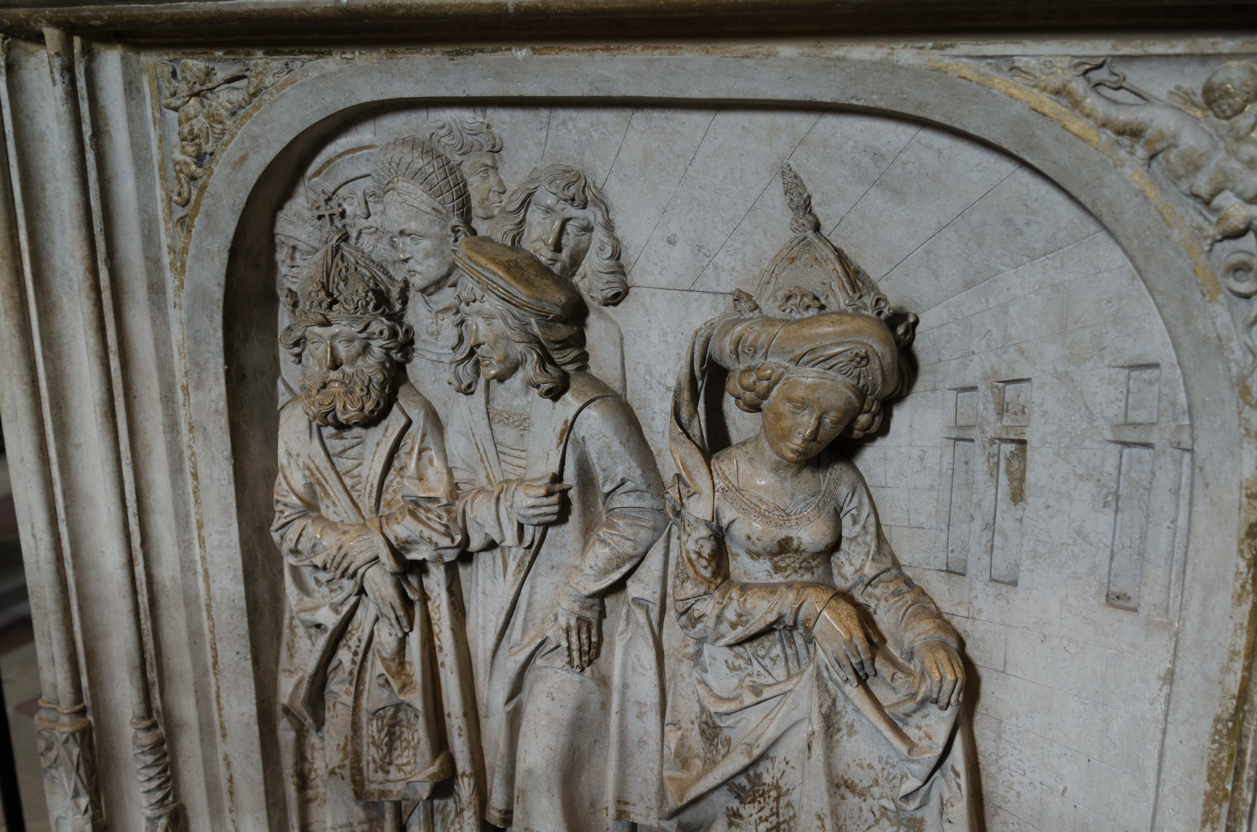 Bamberger Dom